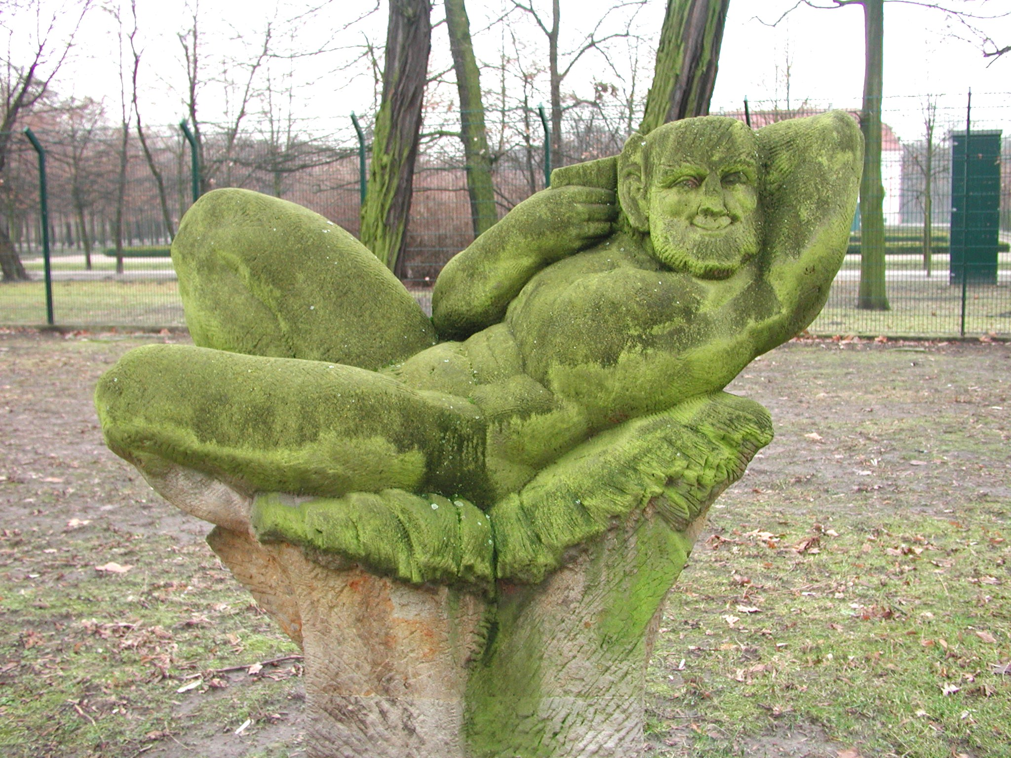 Karl-Günter Möpert: Pan, Sandsteinfigur vor dem Zaun zum Tierpark